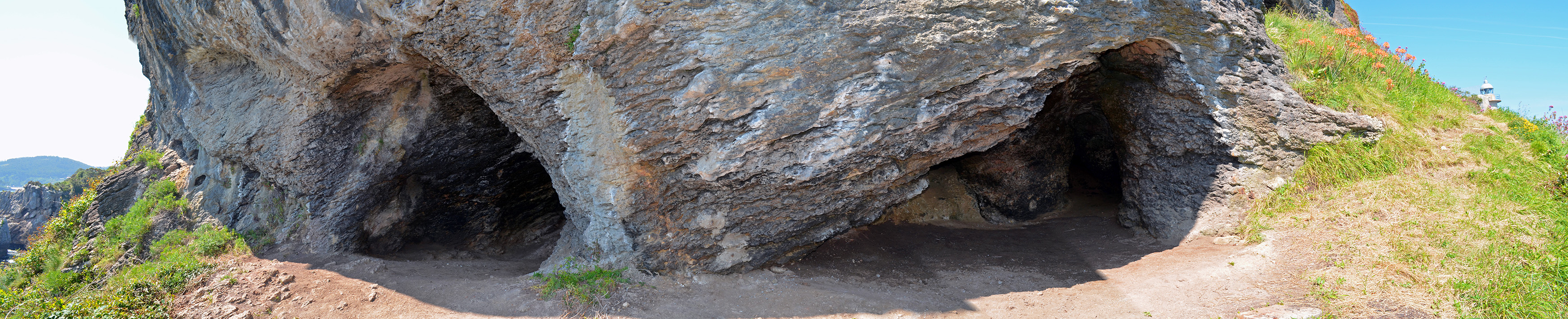 Santa Katalina / Anzoriz I aztarnategiaren egoera, 2015ko egokitze lanen ostean.